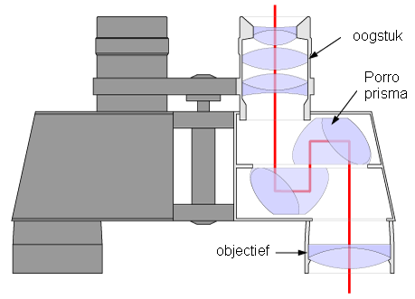 onderdelen verrekijker, vertaald naar NL door MADe van origineel :en:Image:Binocular-optics.png